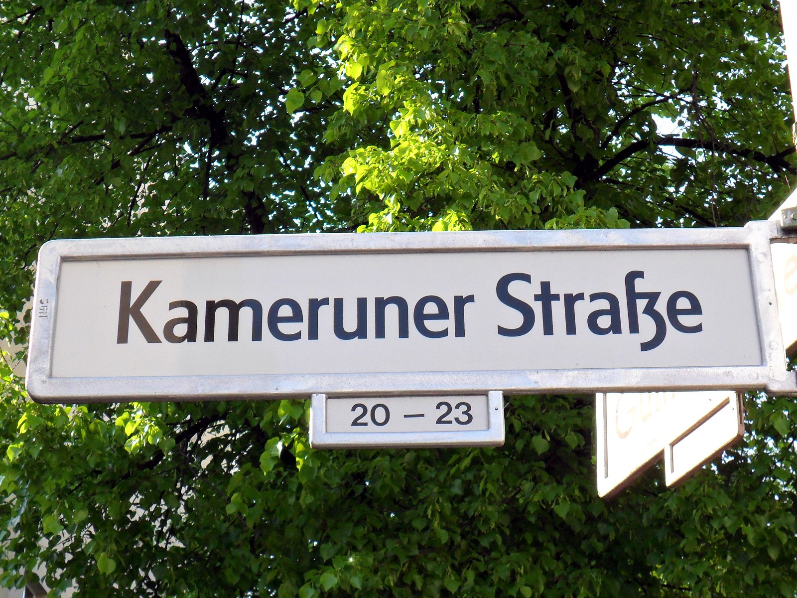 Straßenschild der Kameruner Straße in Berlin-Wedding (Afrikanisches Viertel), benannt nach der deutschen Kolonie Kamerun